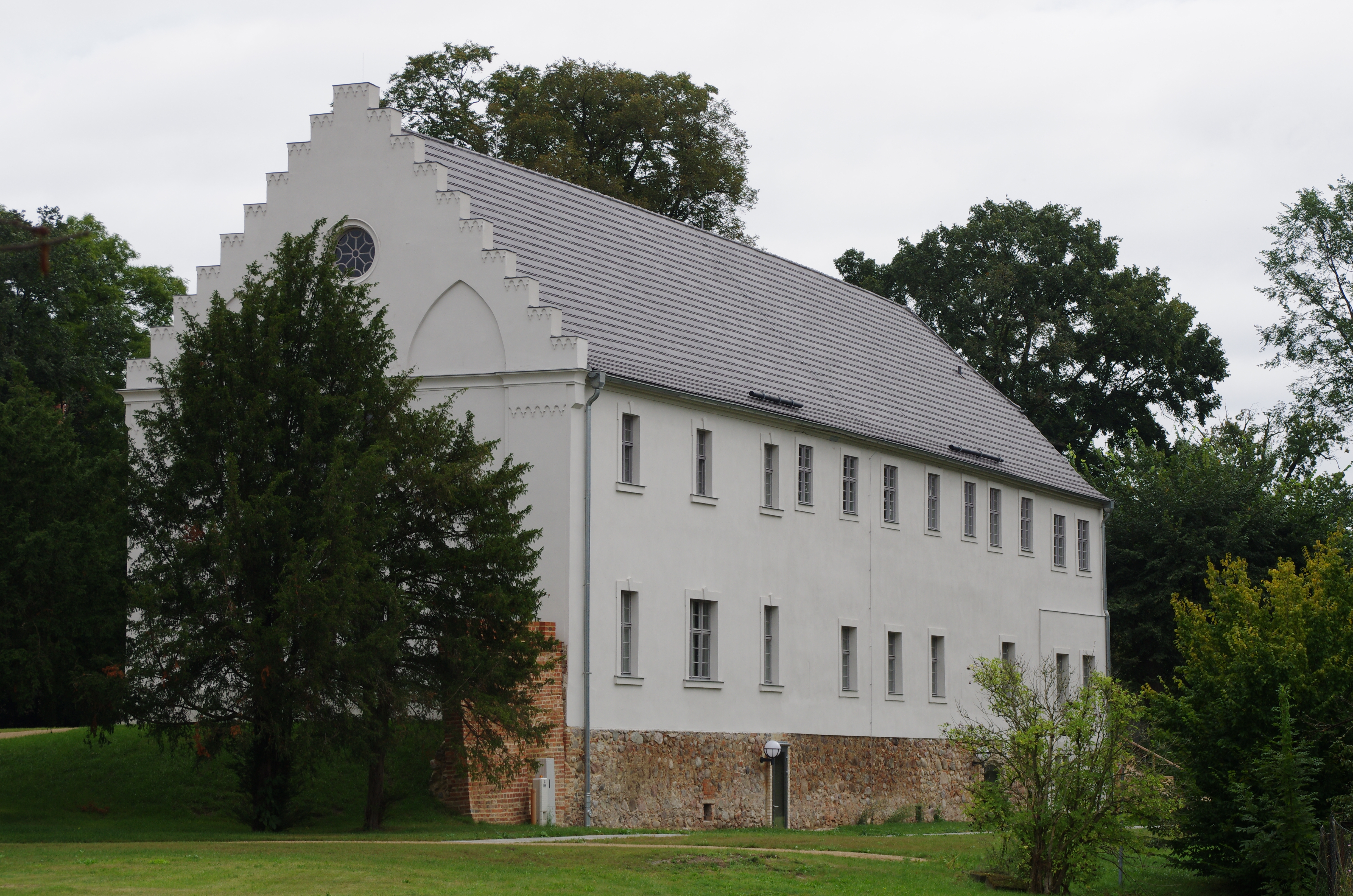 Baruth/Mark in Brandeburg. Das Schloss ist der Sitz der Familie Solms-Baruth gewesen und stetht unter Denkmalschutz.